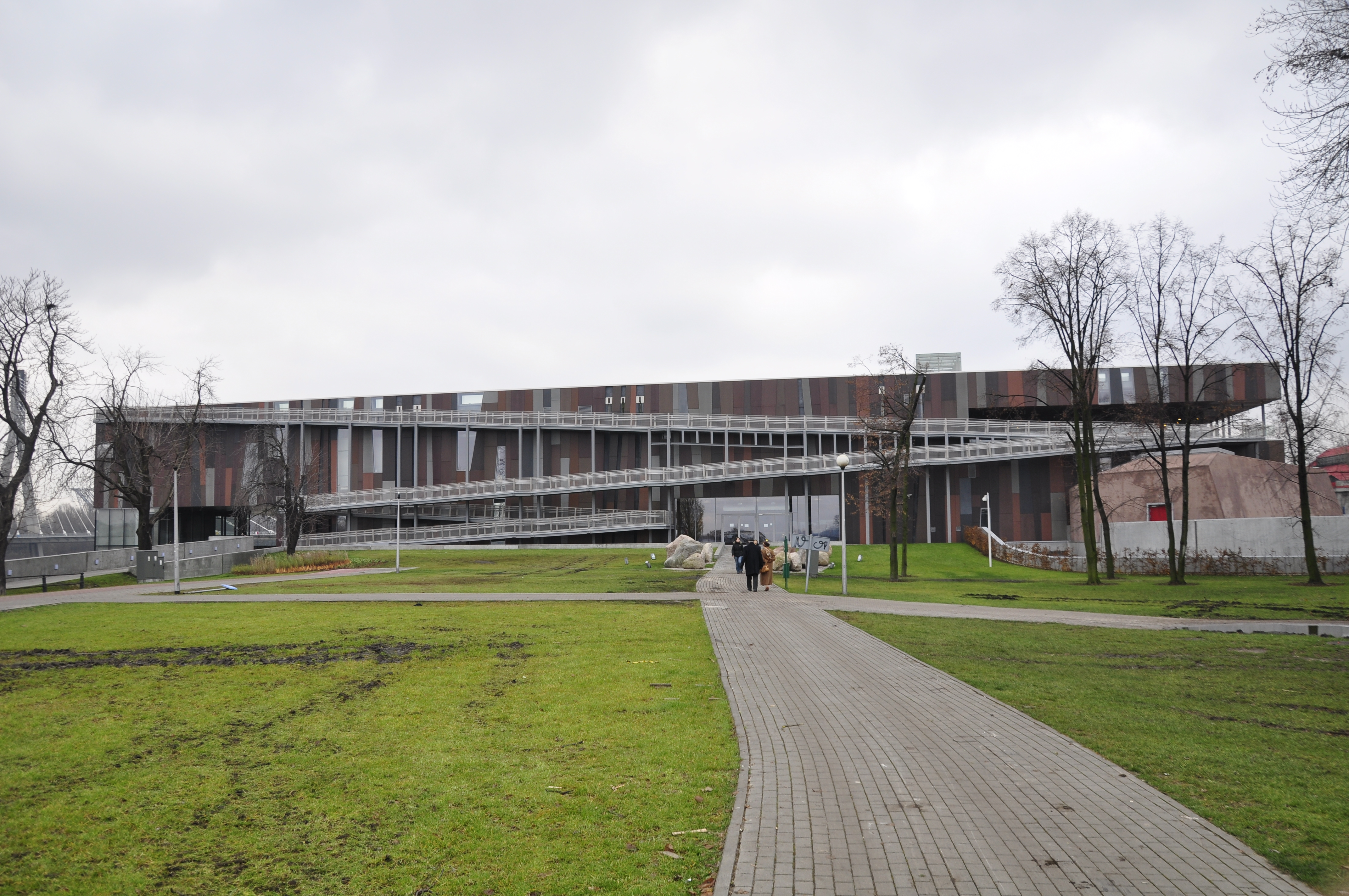 Zentrum Kopernikus Warschau